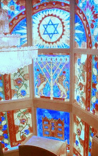 Синагога Хабада в Марьиной Роще Москва